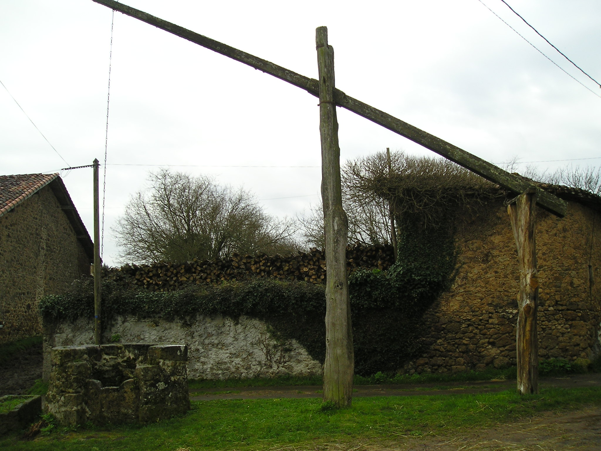 Cigogne de Pers, puits à balancier, Pressignac, Charente, France.